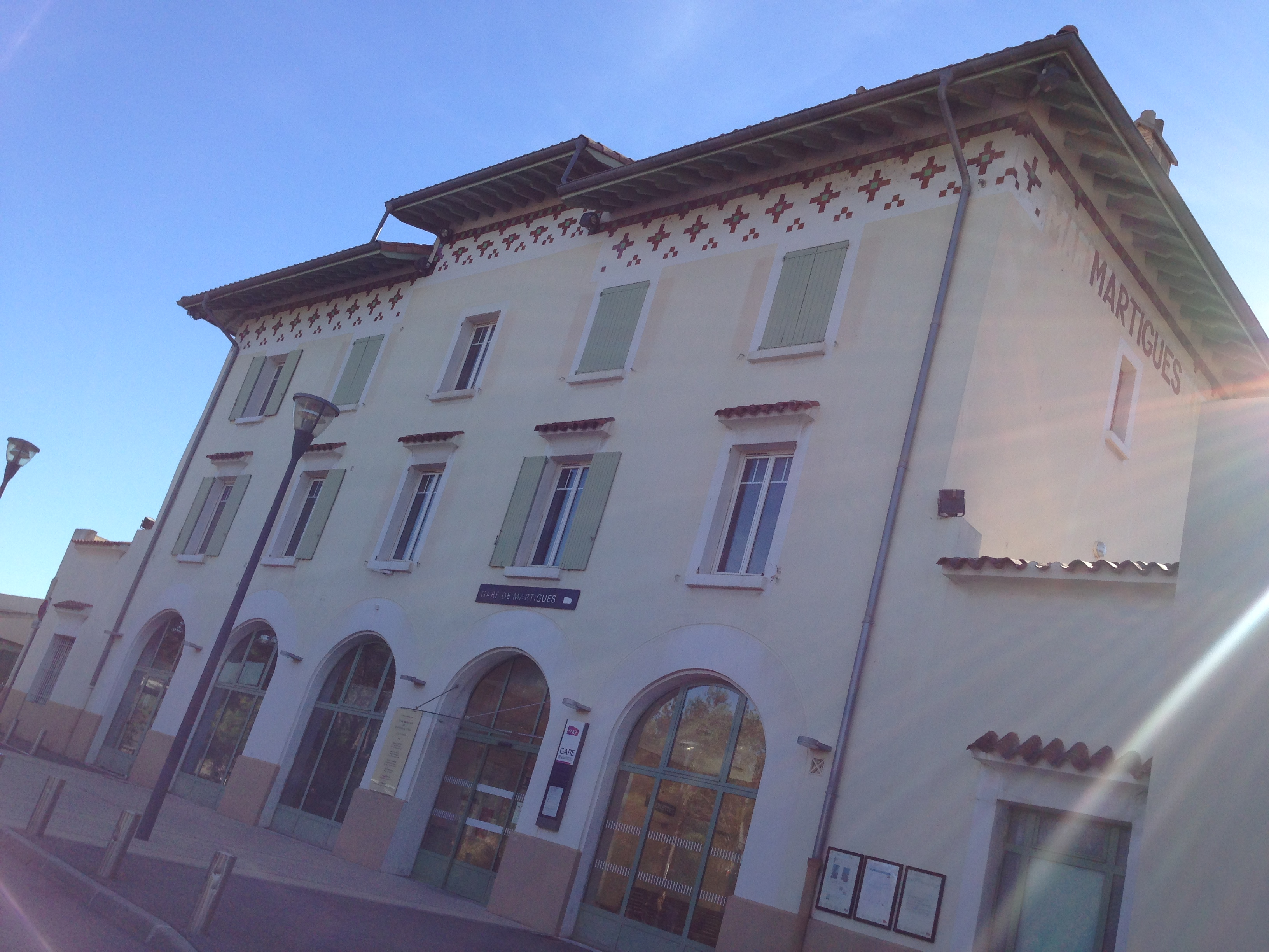 Gare de Martigues en Juillet 2017